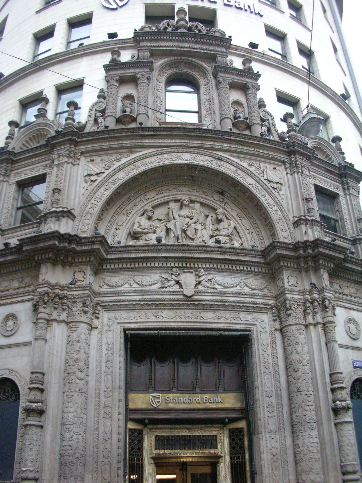 Sucursal del banco Standard Bank en Buenos Aires.